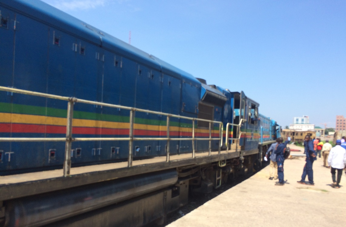 Un tout premier train, parti de Pointe-Noire, a pu rallier la capitale après deux ans d'interruption de trafic à cause de la guerre dans le Pool. Ce train, qui transportait du carburant, est considéré comme un signe de retour à la paix. Arrivée du train à Brazzaville, au Congo, le 28 novembre 2018. (VOA/Arsène Séverin)